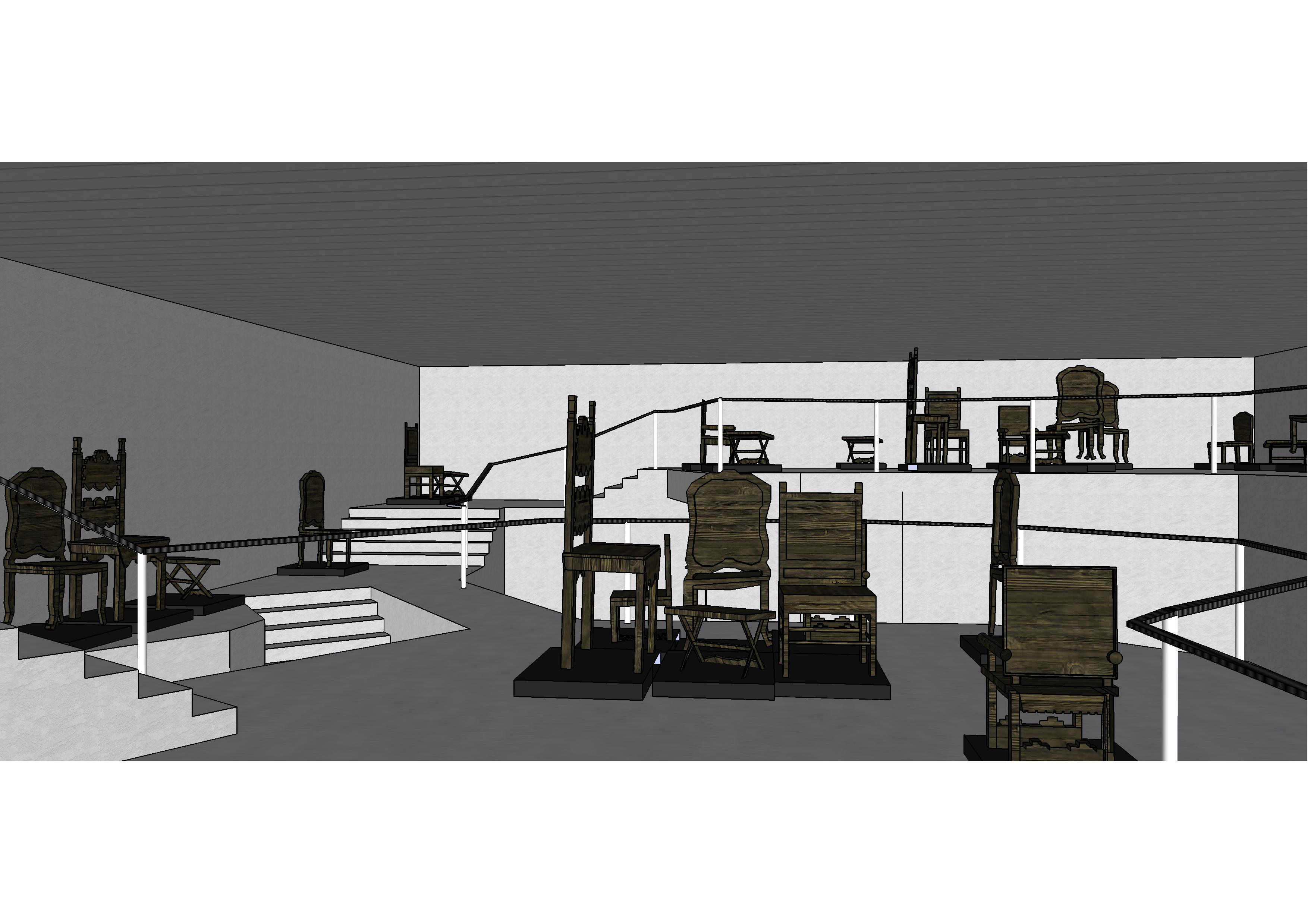 Template:Screenshotcopyrighted